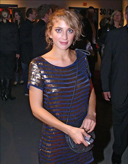 Nora Binder beim Deutschen Comedypreis 2007